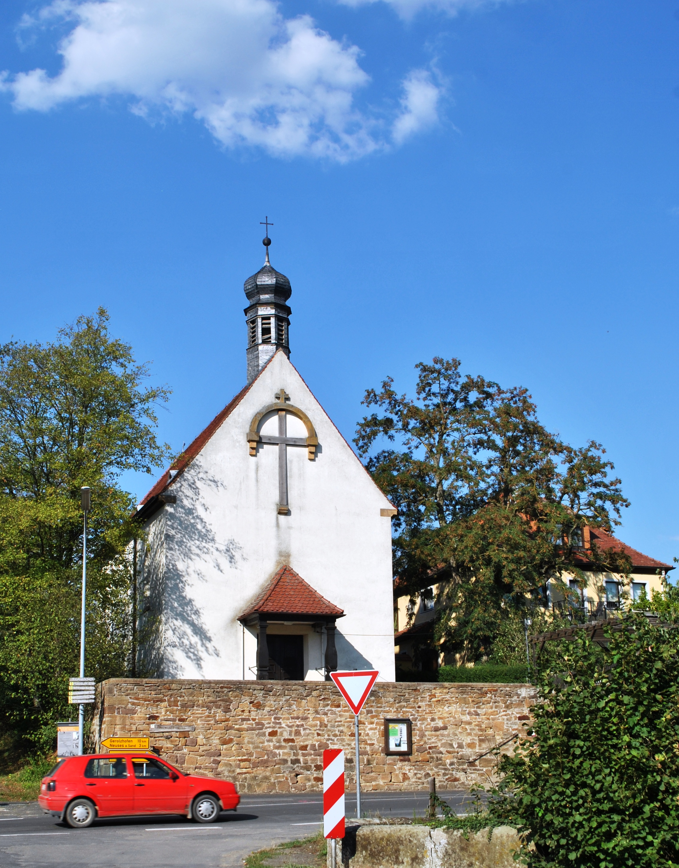 Katholische Filialkirche St. Thekla und Lioba, einfacher Saalbau mit Dachreiter, um 1930This is a photograph of an architectural monument.